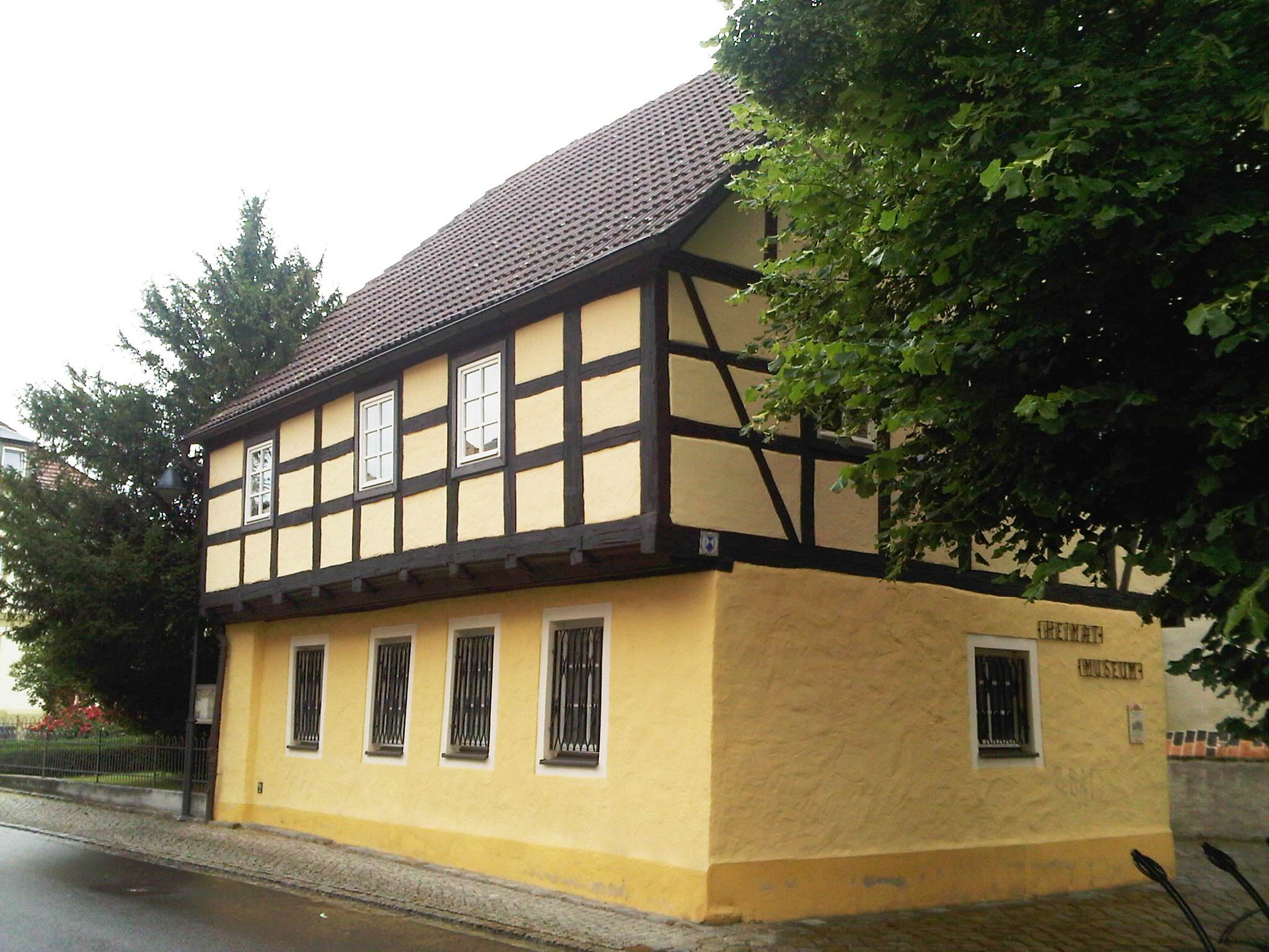 Heimatmuseum (ehemalige Mädchenschule) in Calau, Kleinstadt im Landkreis Oberspreewald-Lausitz in Brandenburg